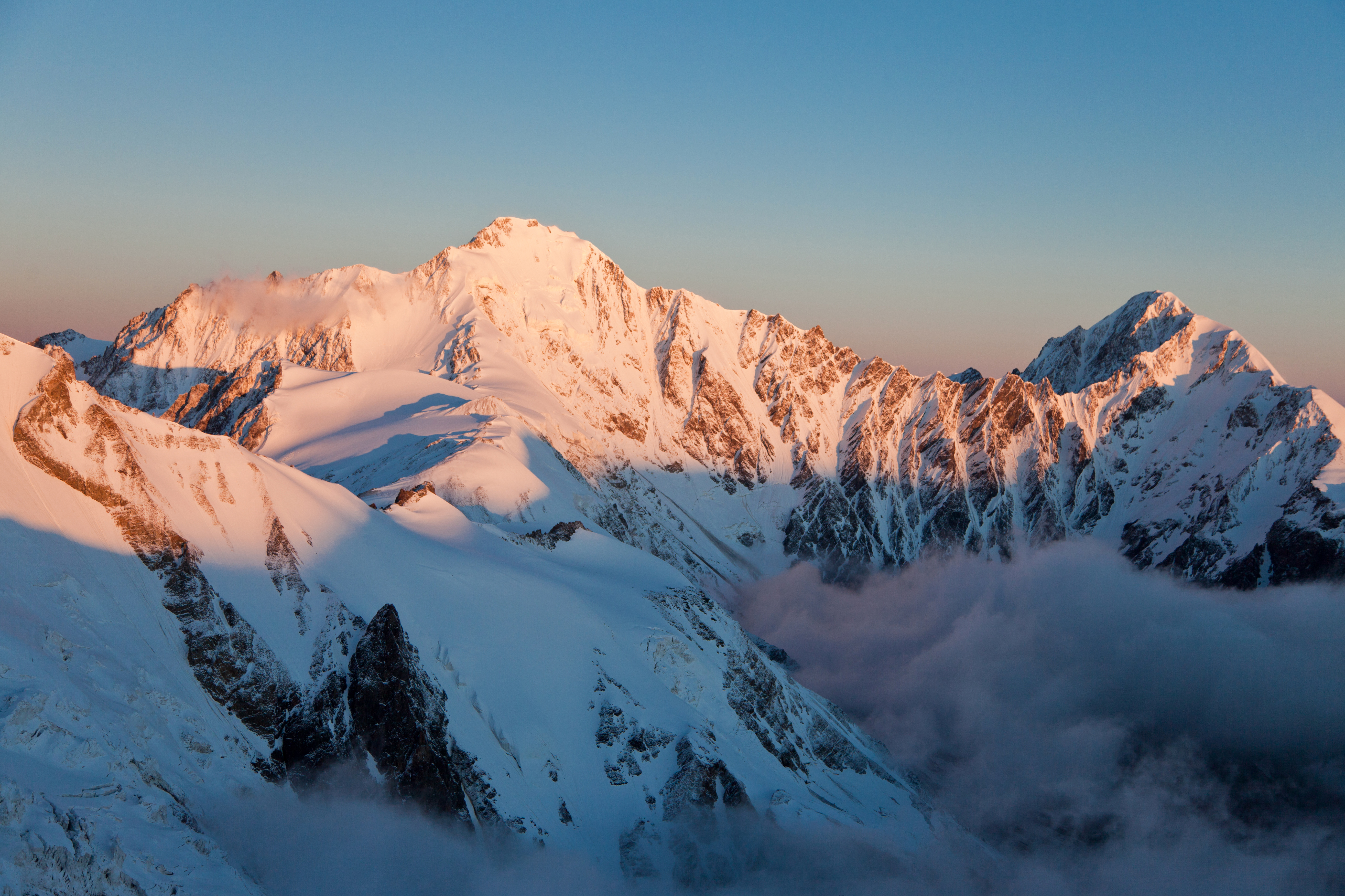 Массив Джимарайхох: Пригородный район, Северная Осетия This image is related to the protected area of Russia number 1510320